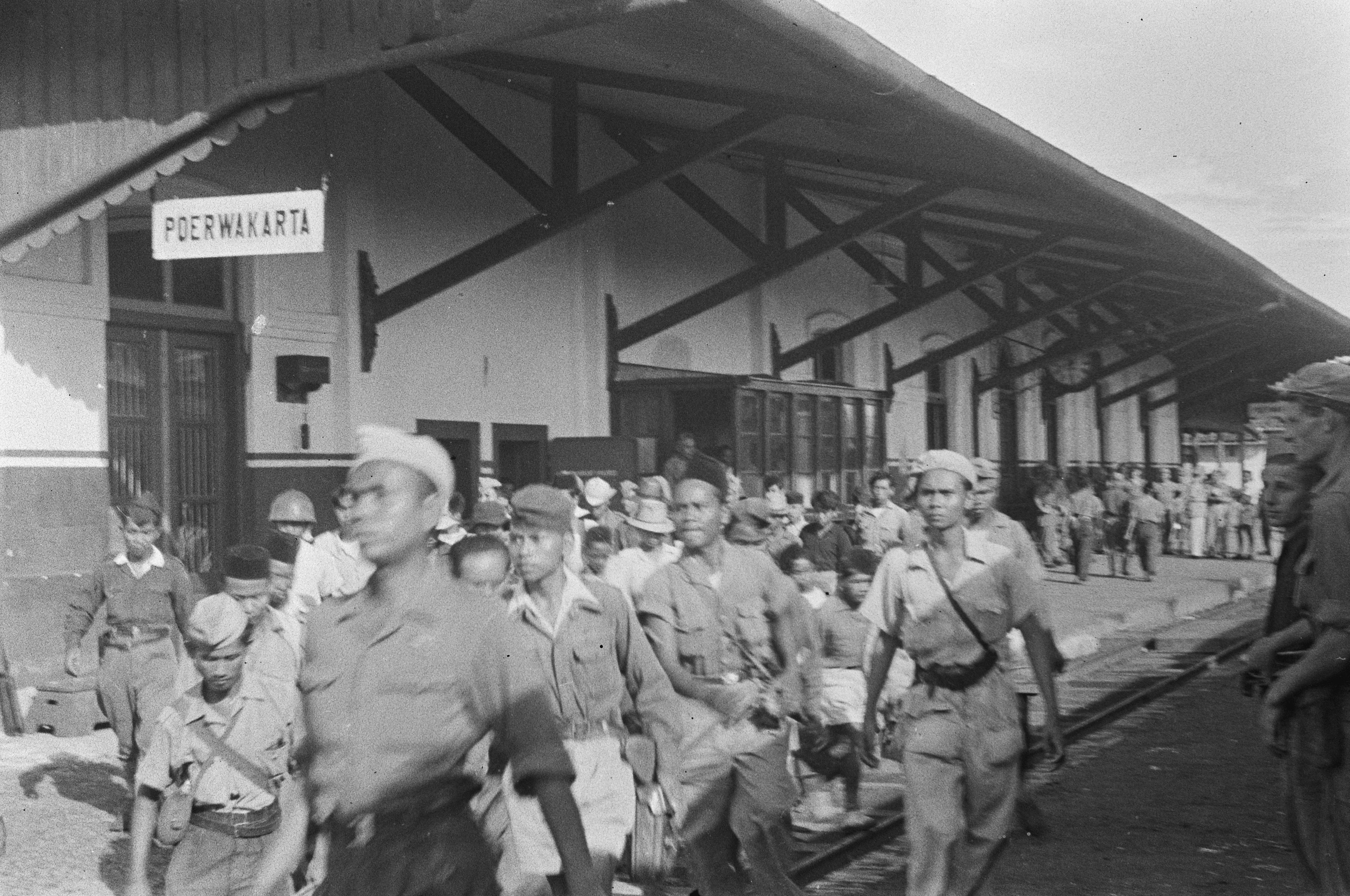 Collectie / Archief : Fotocollectie Dienst voor Legercontacten Indonesië Reportage / Serie : [DLC] Poerwakarta: evacuatie T.N.I. staf 2e Inf. Brig. Groep Beschrijving : Poerwakarta: Het TNI-evacuatie centrum te Poerwakarta heeft druk werk. Dagelijks arriveren grote contingenten, die geregistreerd en gevoed moeten worden. Per trein worden zij daarna afgevoerd. Datum : 10 februari 1948 Locatie : Indonesië, Nederlands-Indië, Purwakarta Fotograaf : Wakker, H. / DLC Auteursrechthebbende : Nationaal Archief Materiaalsoort : Negatief (zwart/wit) Nummer archiefinventaris : bekijk toegang 2.24.04.03 Bestanddeelnummer : 1534-3-6